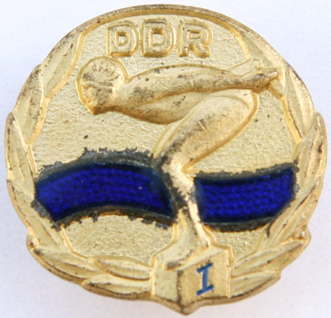 Schwimmabzeichen DDR, Stufe 1, Höhe 20 mm